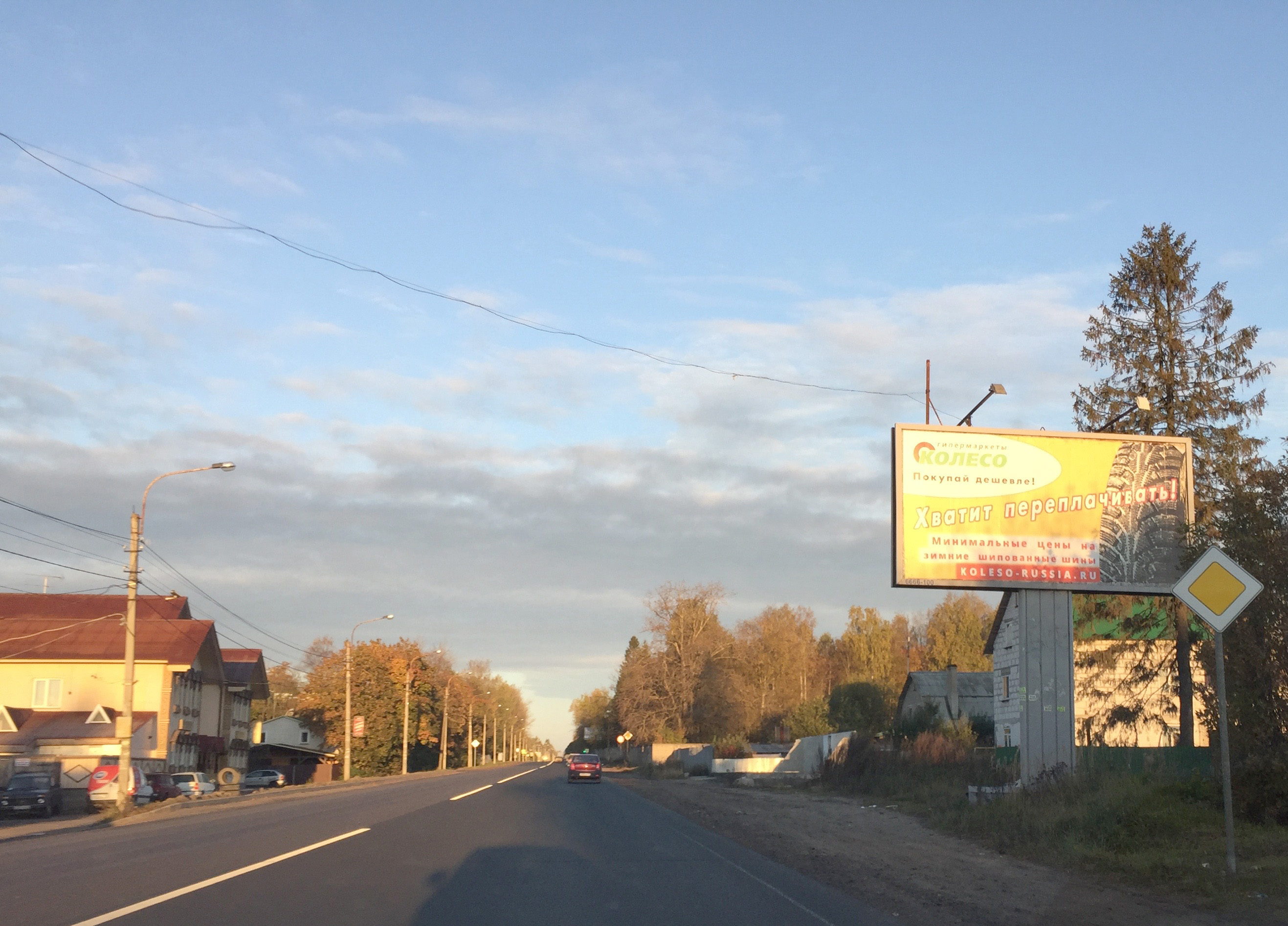 Черная речка